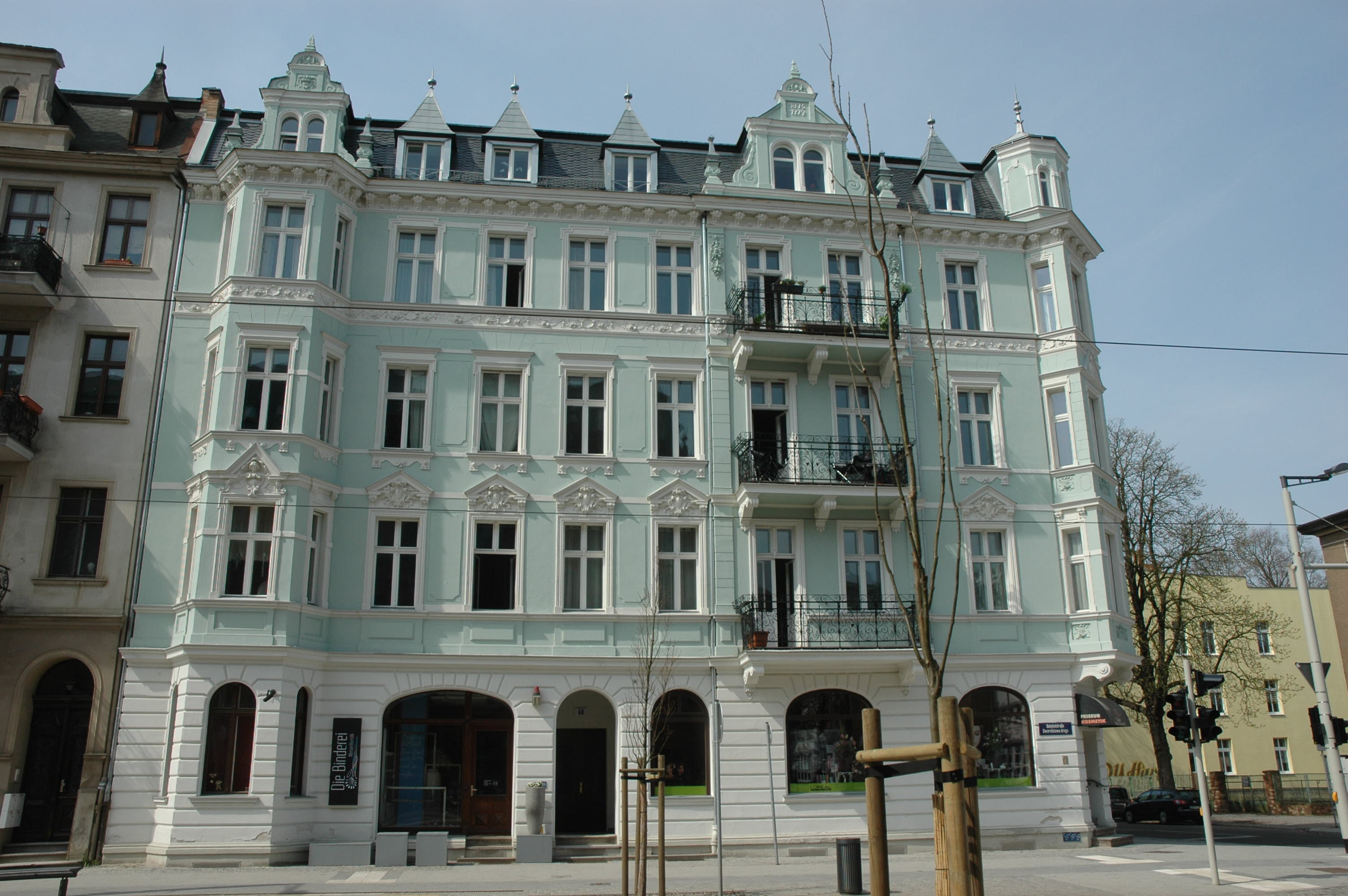 Bahnhofstraße 68